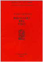 Première page du livre du poète espagnol José Manuel Caballero Bonald : Brevario del Vino (1980).